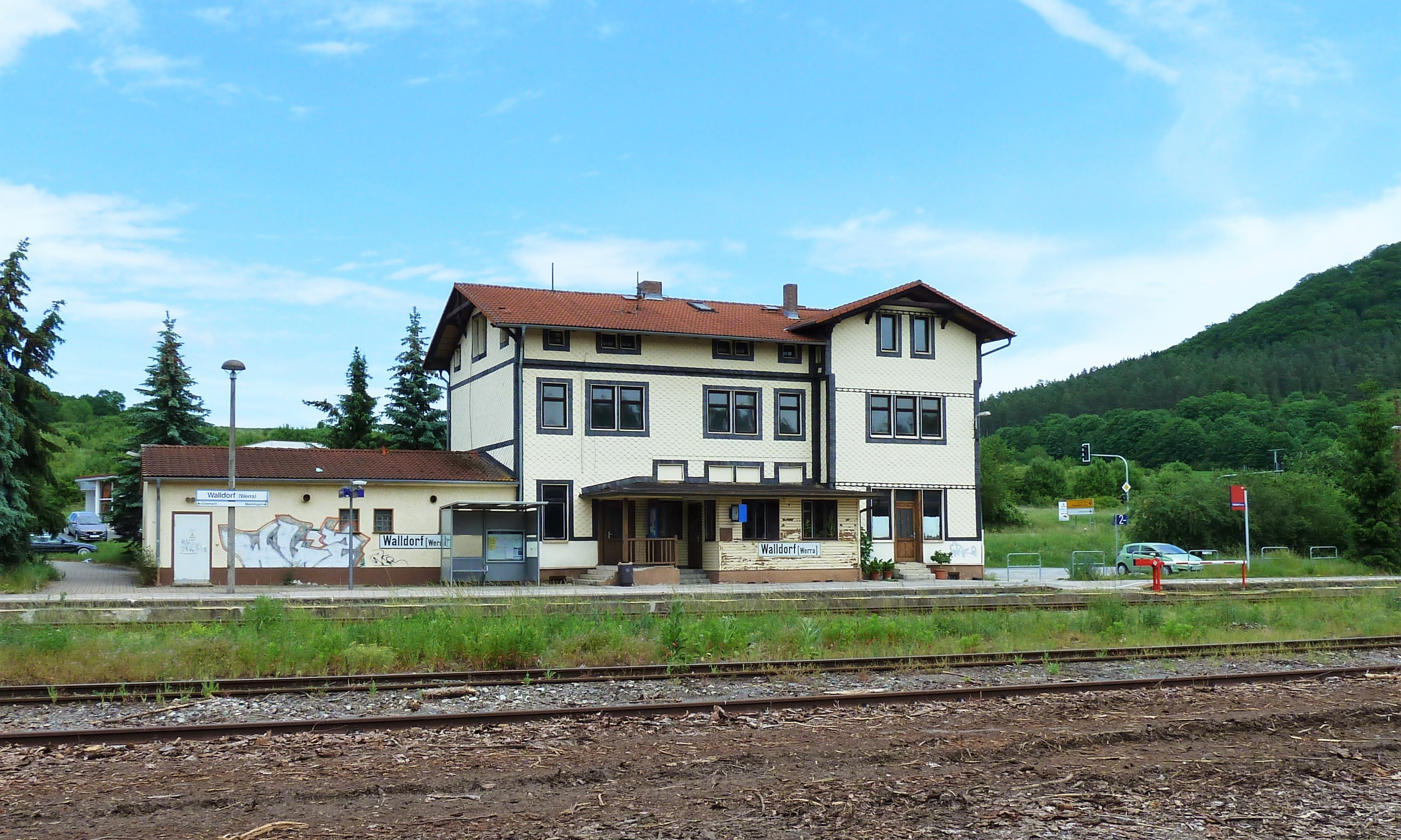 Bahnhof Walldorf (Werra) im Ortsteil Walldorf der Stadt Meiningen.